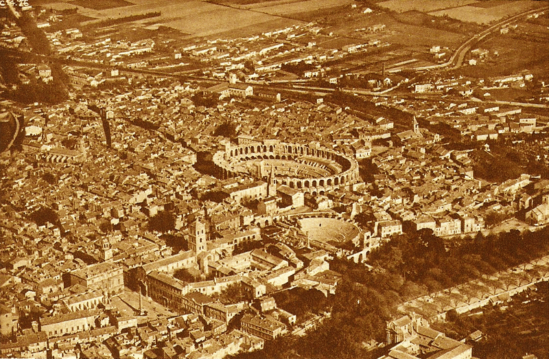 Gweled dre an aer e 1928